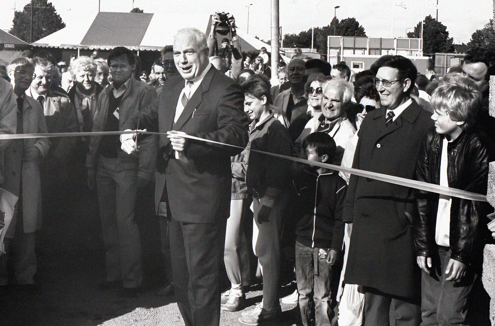 Bertil Göransson inviger en park på Bo86 i Malmö 1986.Tv i bilden syns även Nils Yngvesson